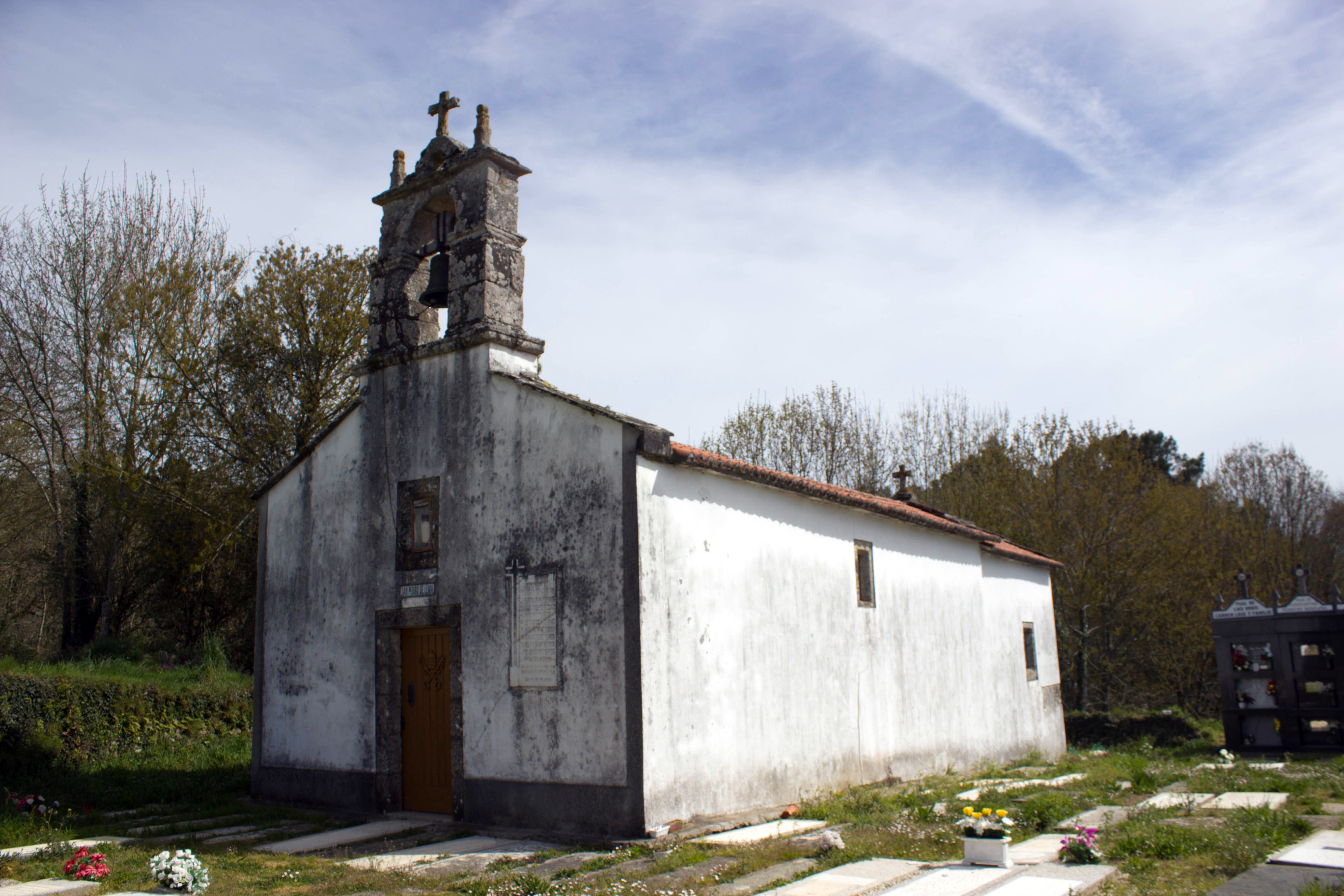 Igrexa de San Pedro de Lema, no concello de Arzúa.